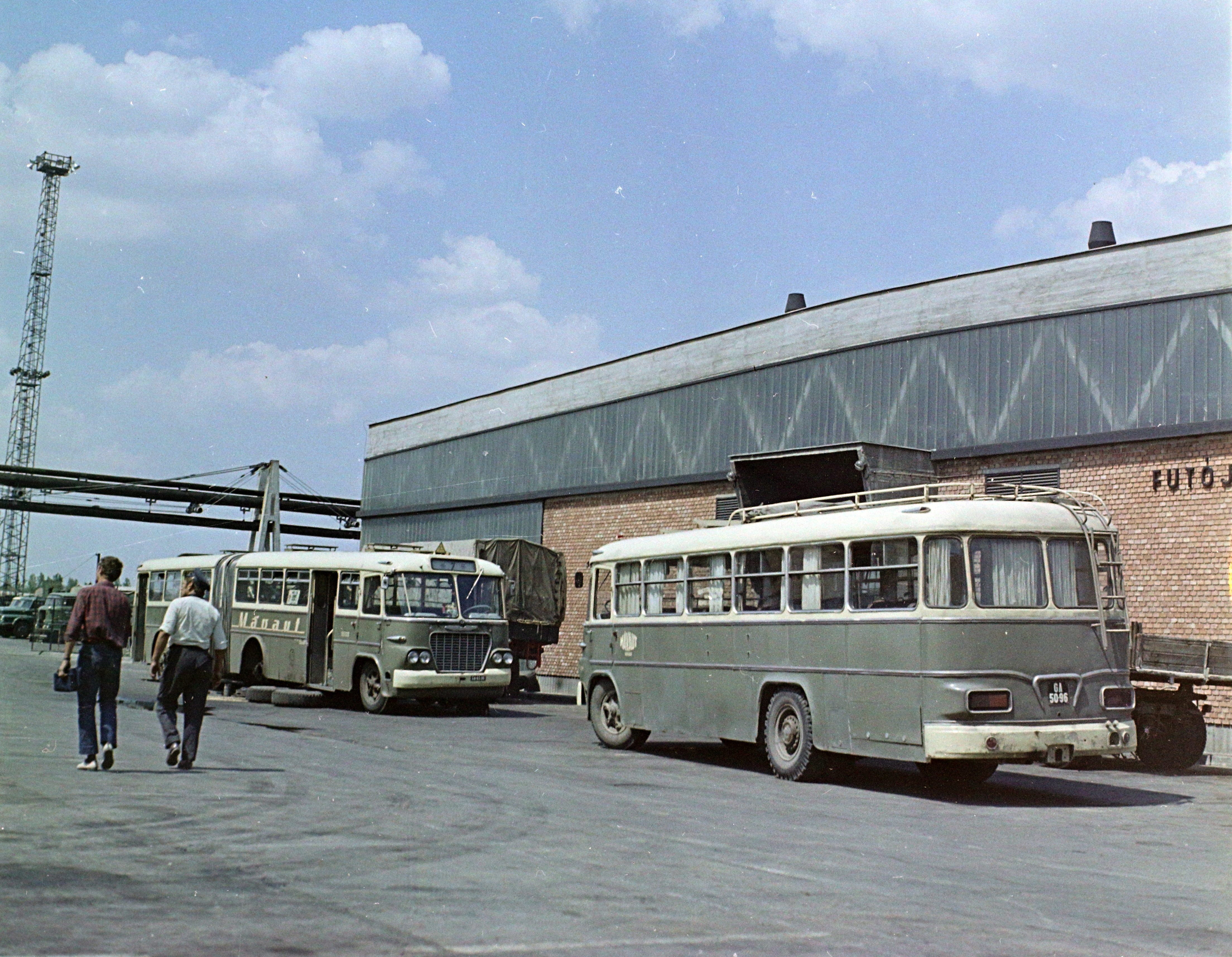 a 10. AKÖV (később a 10. VOLÁN, Tisza Volán, DAKK) telephelye. Location: Hungary, Szeged Tags: colorful, bus, Ikarus-brand, MÁVAUT-organisation Title: a 10. AKÖV (később a 10. VOLÁN, Tisza Volán, DAKK) telephelye.